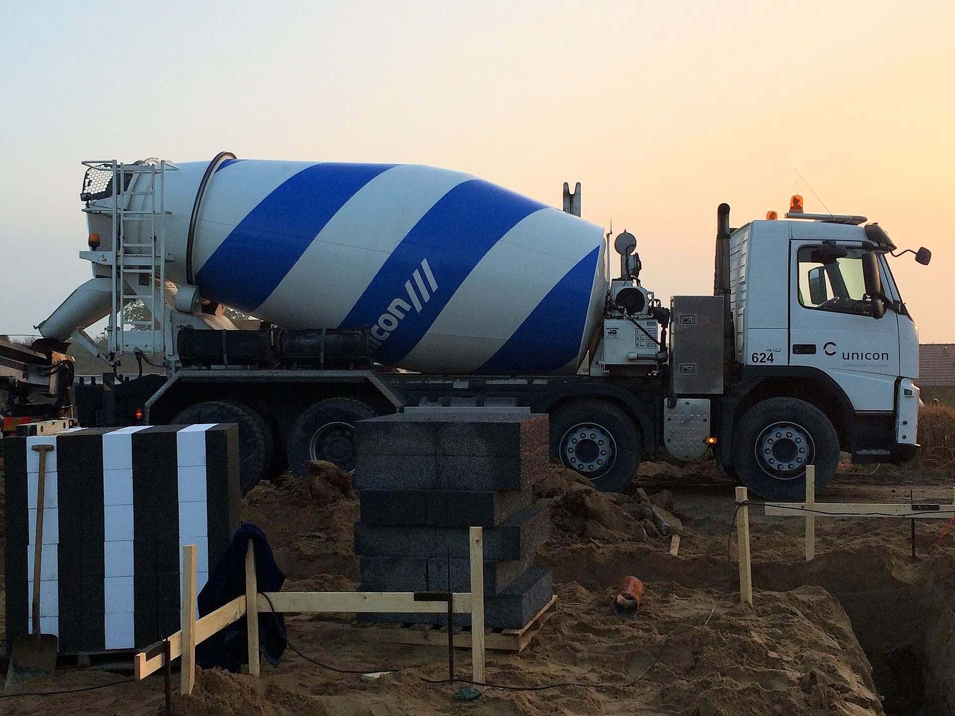 Unicon rotérbil